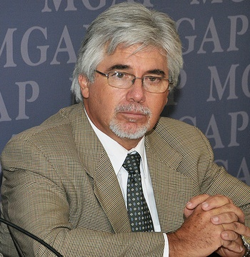 Tabaré Aguerre, Ministro de Ganadería de Uruguay